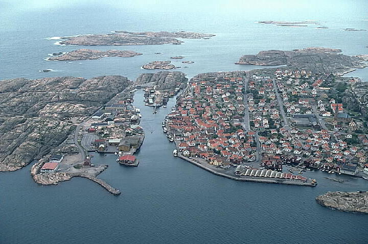 Motiv: Smögen Nyckelord: Flygbilder, Naturreservat, Riksintressen Kategori: FiskelägeSmögen